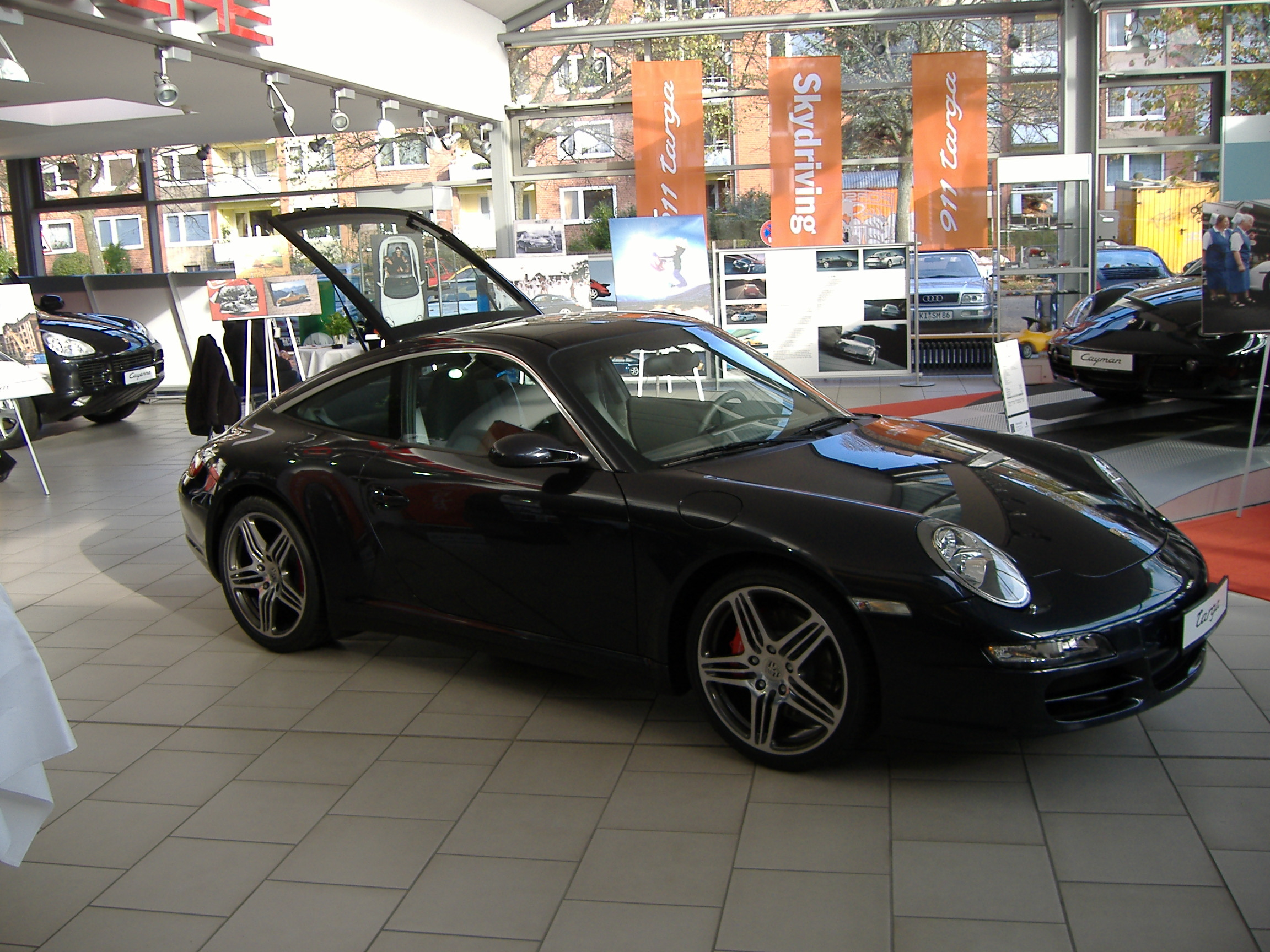 Porsche 997 Targa - geöffnete Heckklappe